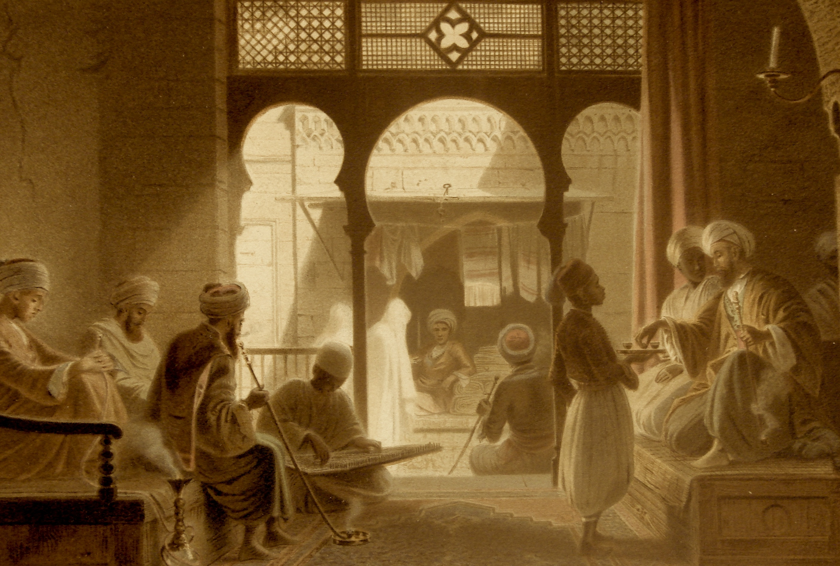 Scene de Café au Caire Egypte